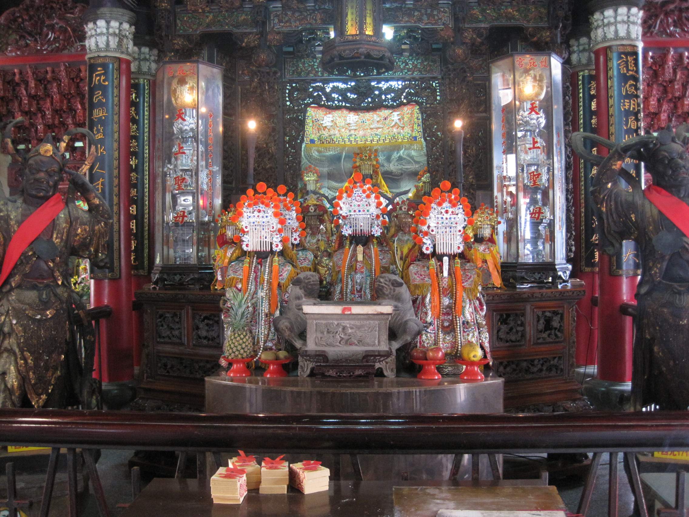 鹽水護庇宮正殿